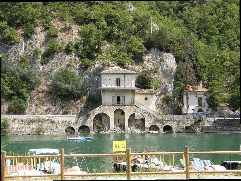 Lago di Scanno 2009